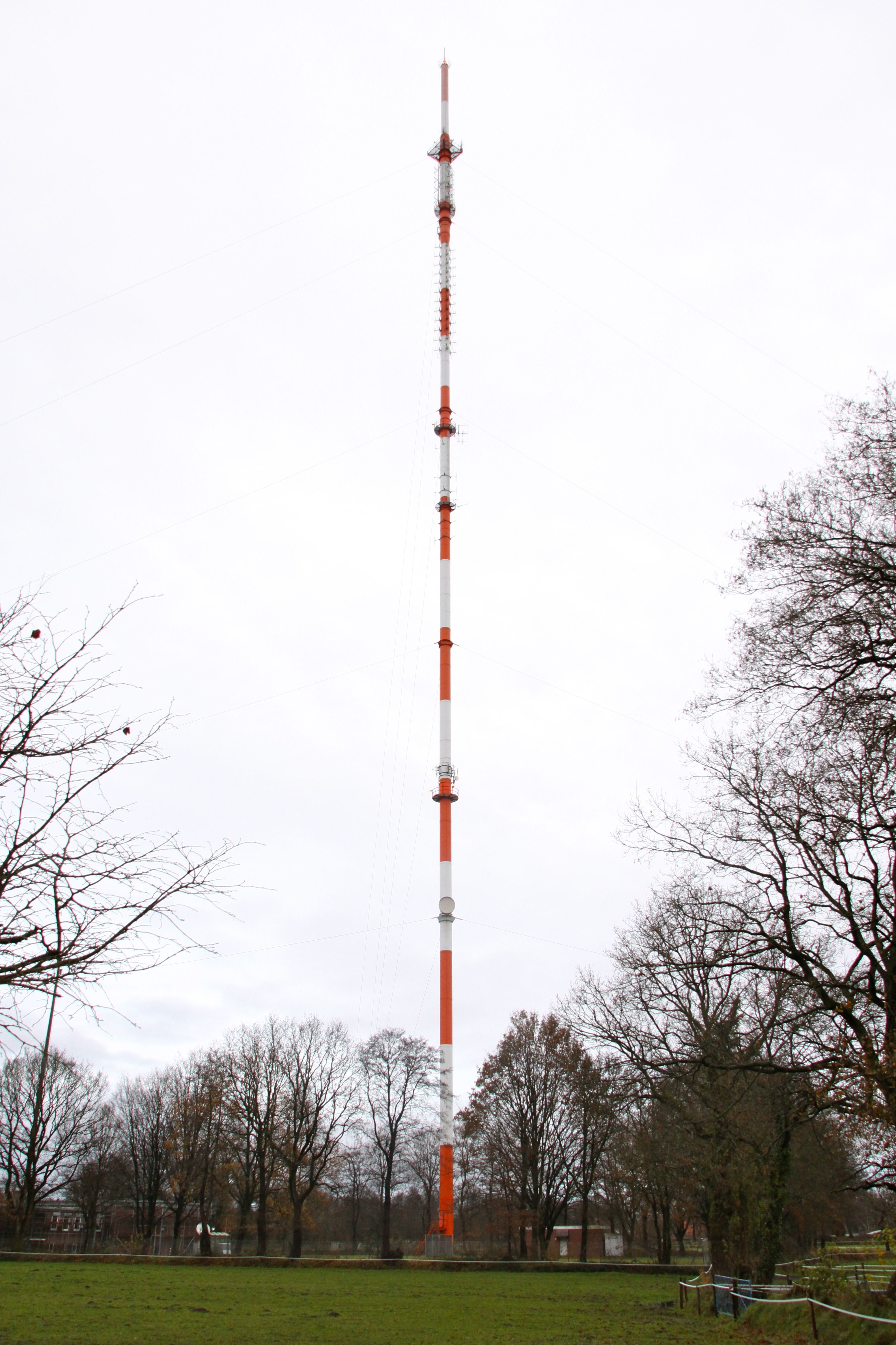 Grundnetzsender Ostfriesland